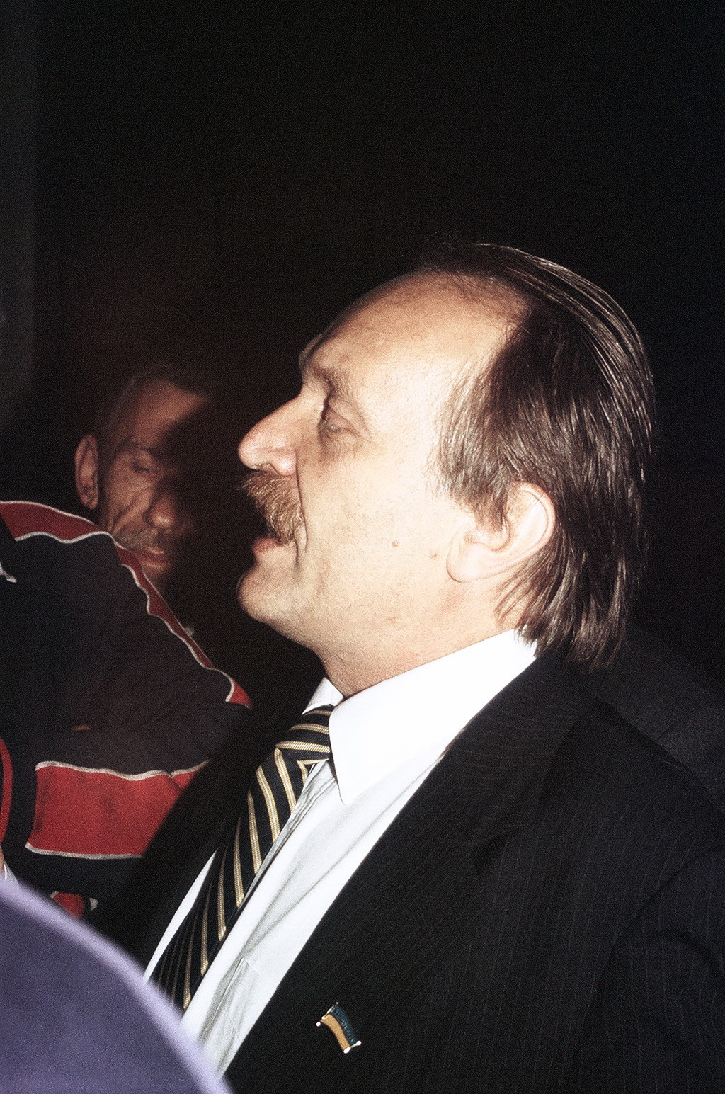 В.М.Чорновіл на шахті ім. Поченкова, Макіївка. 1990-і роки